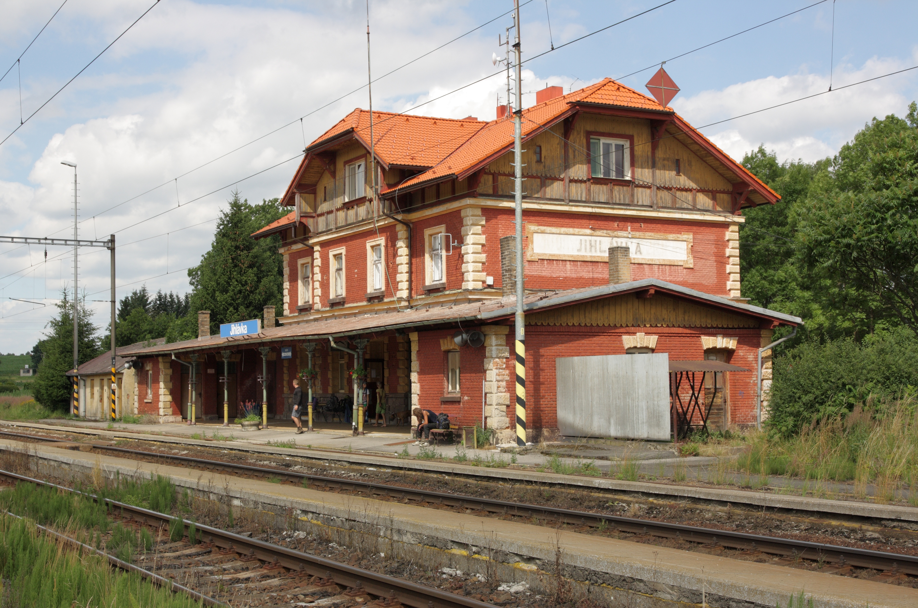 Jihlávka - železniční stanice.